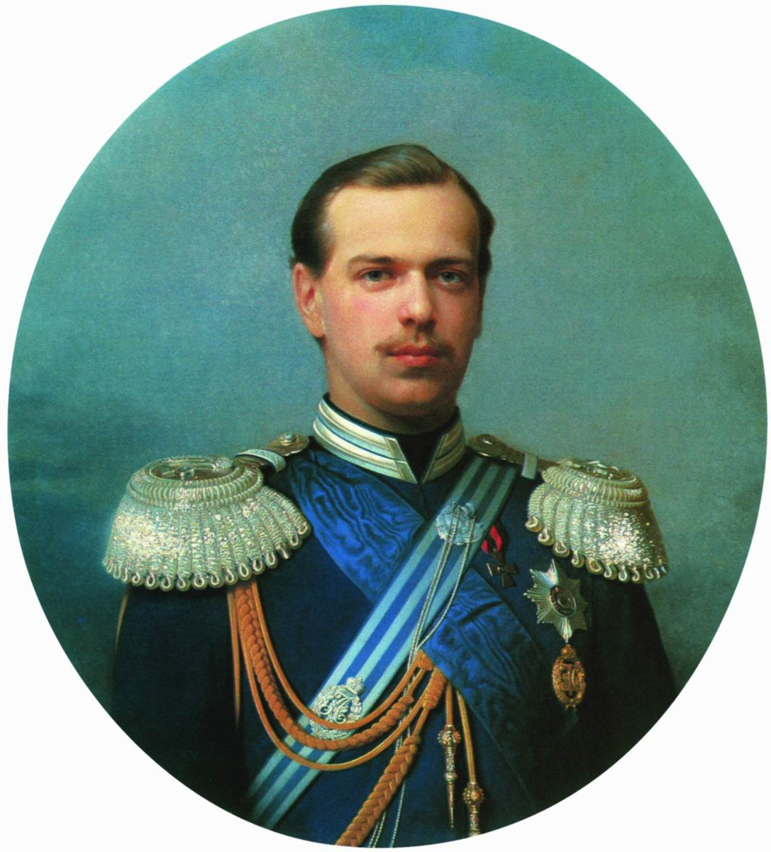 Портрет цесаревича Александра Александровича (1845-1894) в свитском сюртуке